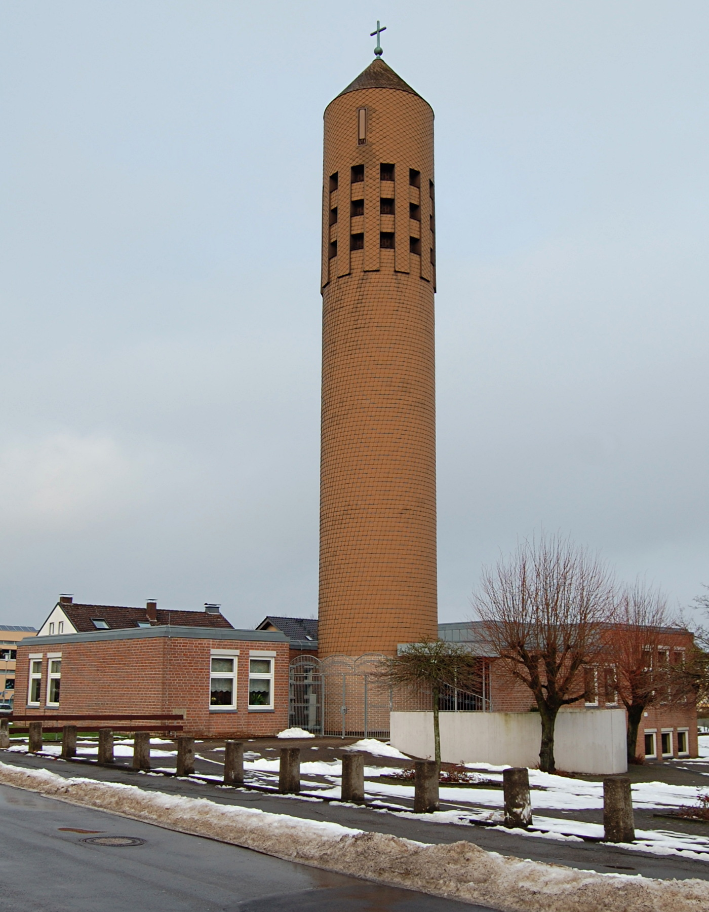 Der 25 m hohe Turm der 1968 eingeweihten katholischen Kirche „Zum verklärten Christus“ in der Driburger Südstadt, Bad Driburg, Nordrhein-Westfalen, Deutschland.